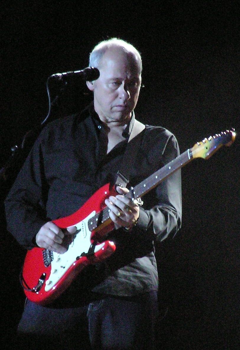 Mark Knopfler Konzert Hamburg 28.05.2006